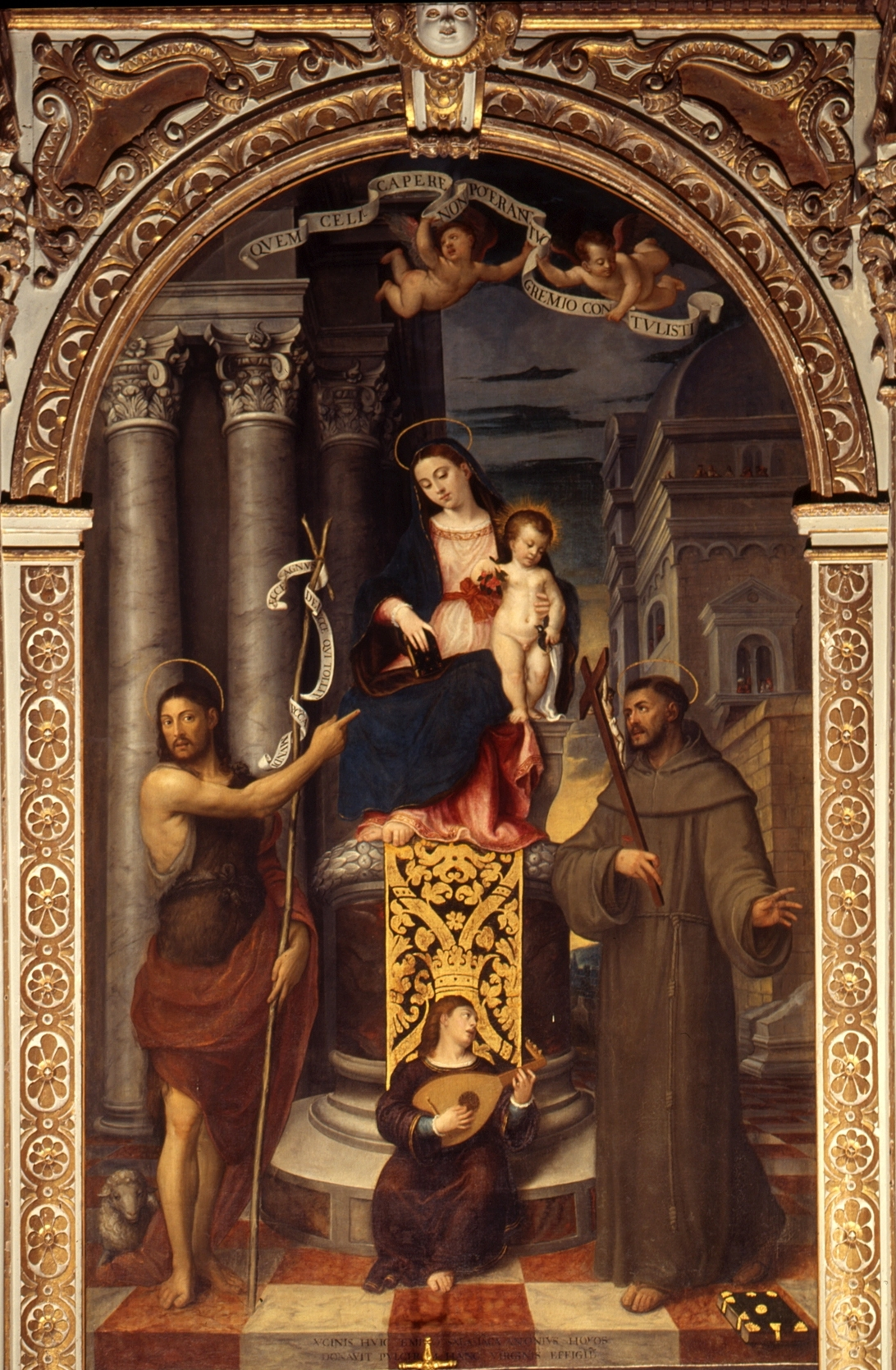 Francesco Beccaruzzi - Vergine in trono tra i SS. Giovanni Battista e Francesco